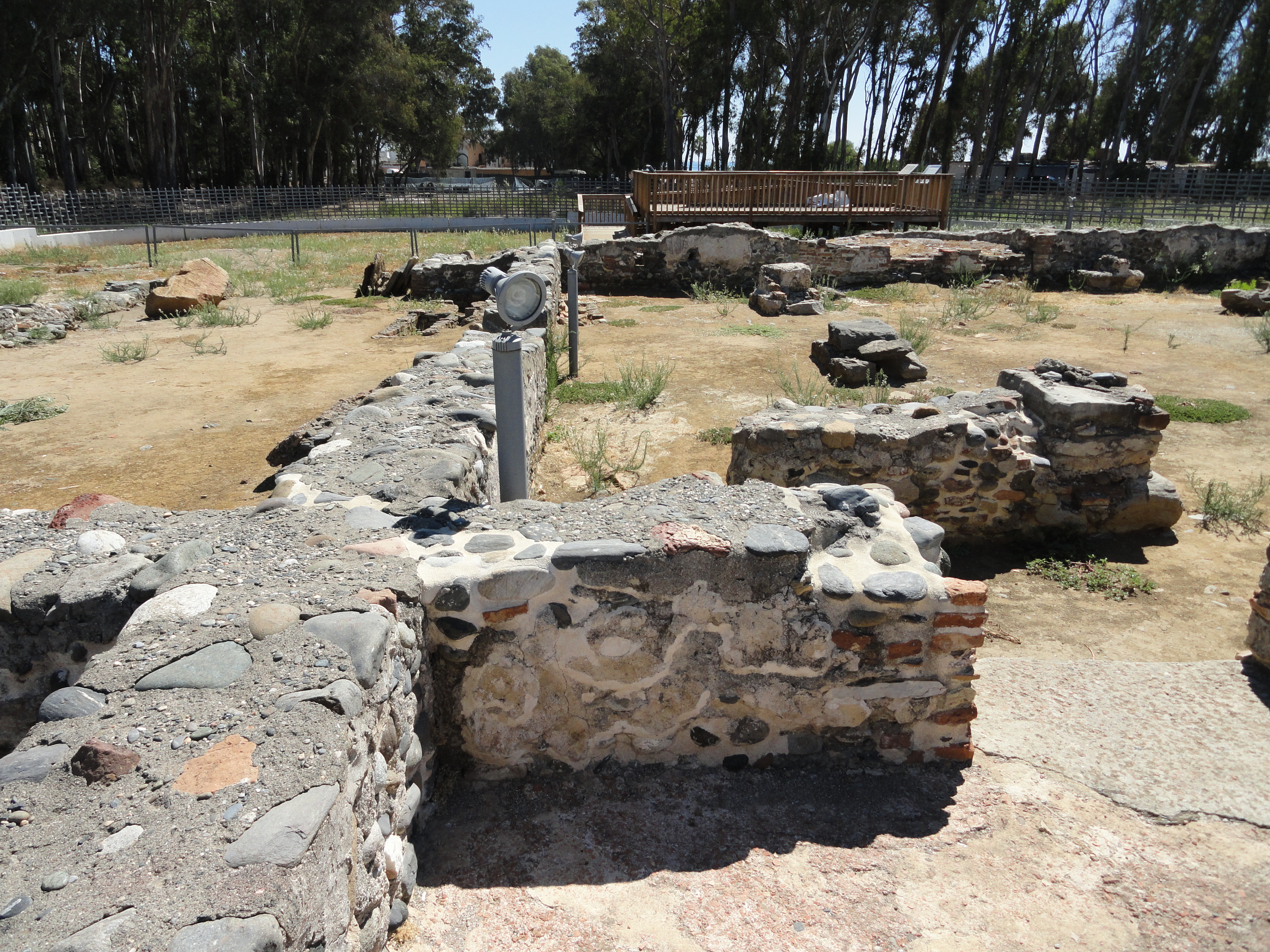 Basílica Paleocristiana de Vega del Mar